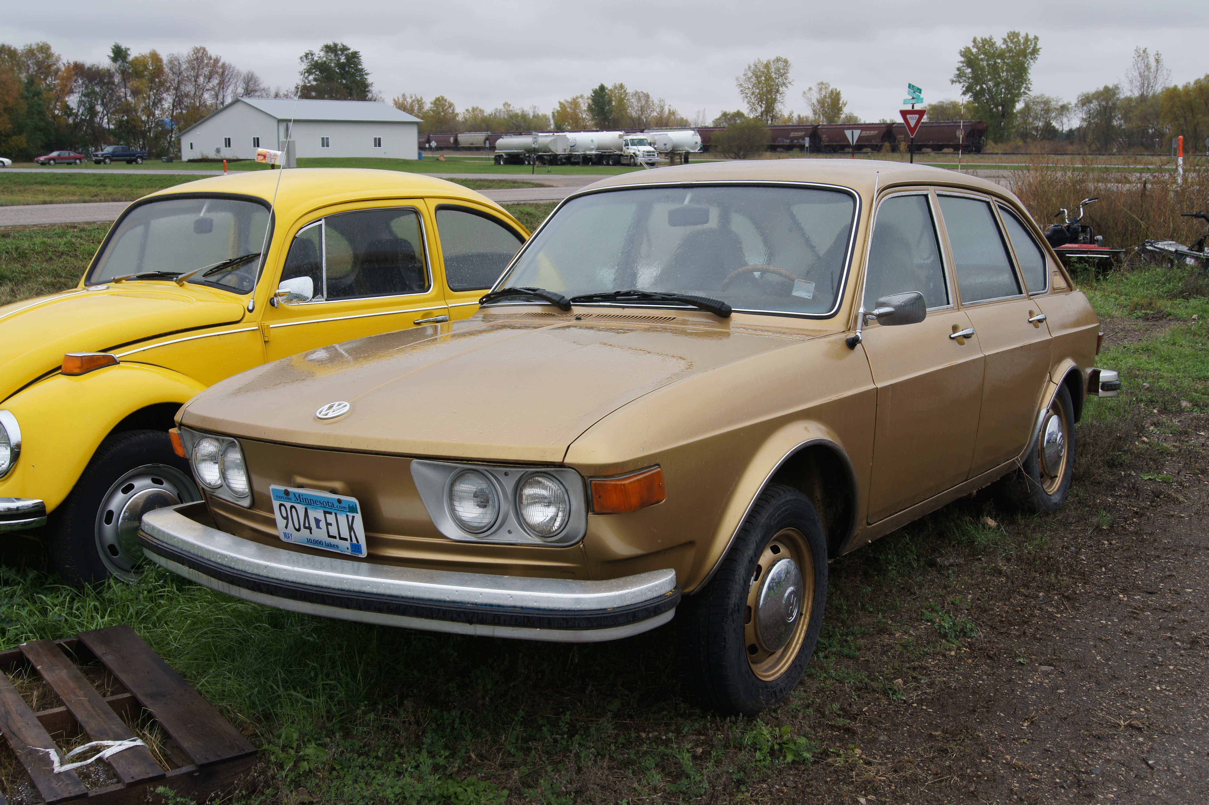 74 Volkswagen 412